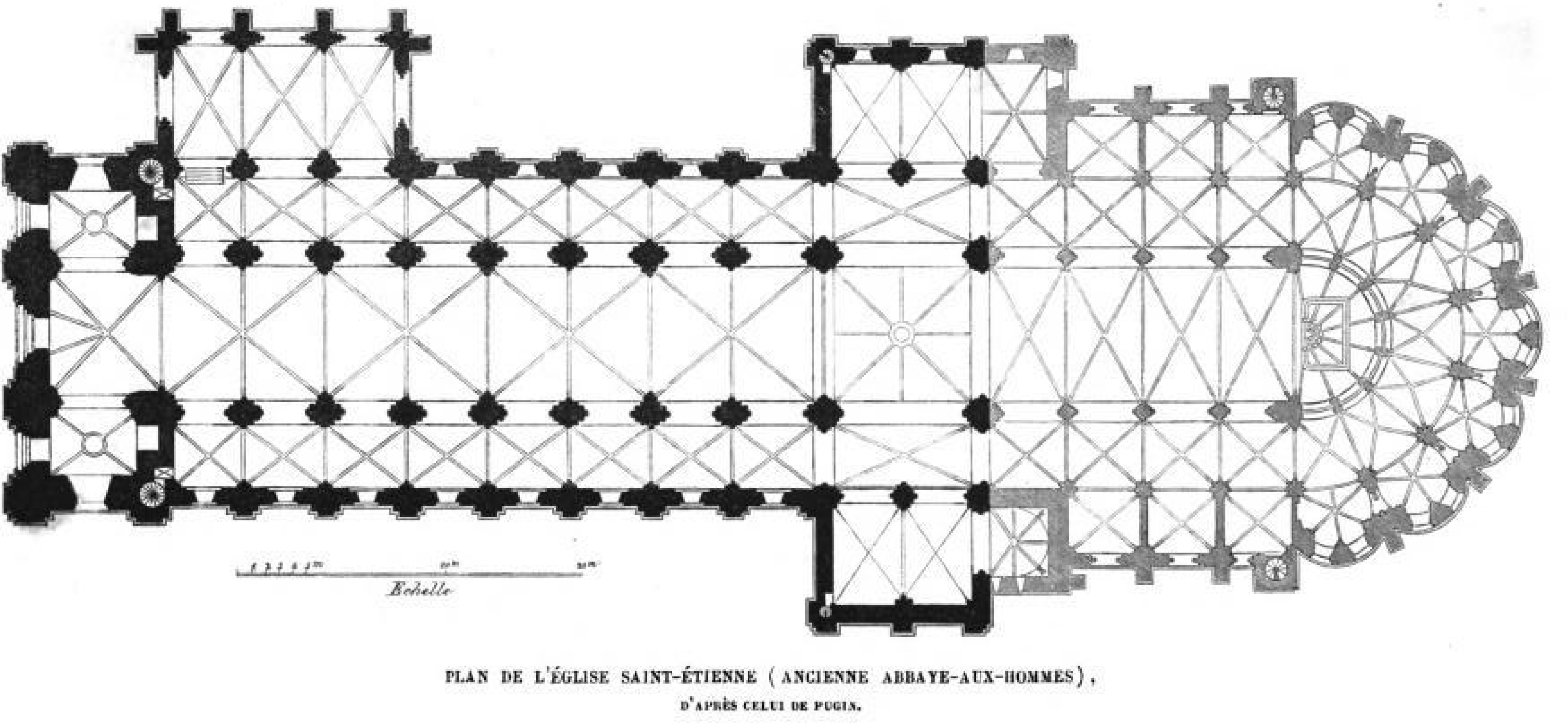 Plan de l'église abbatiale Saint-Étienne de l'abbaye aux Hommes de Caen en 1863